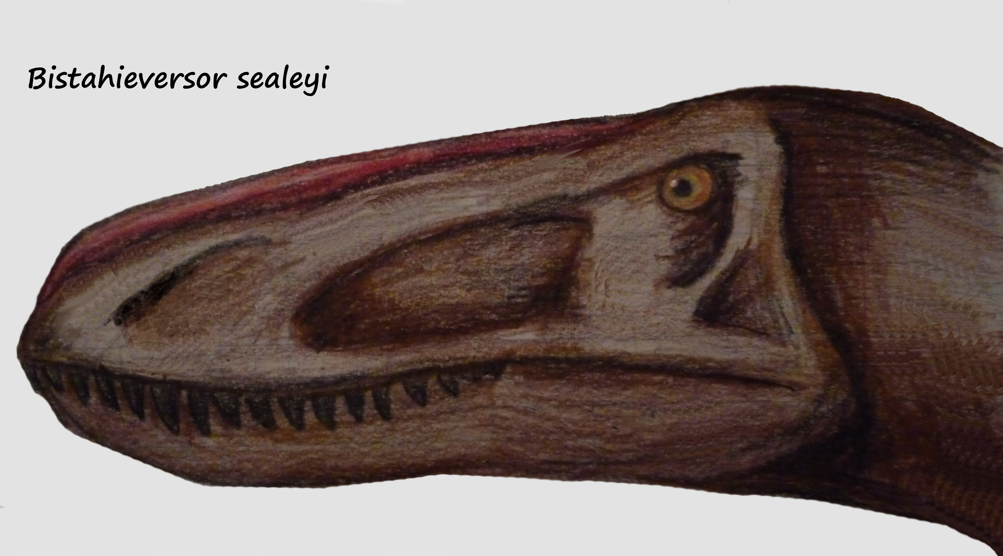 Бистахиэверсор